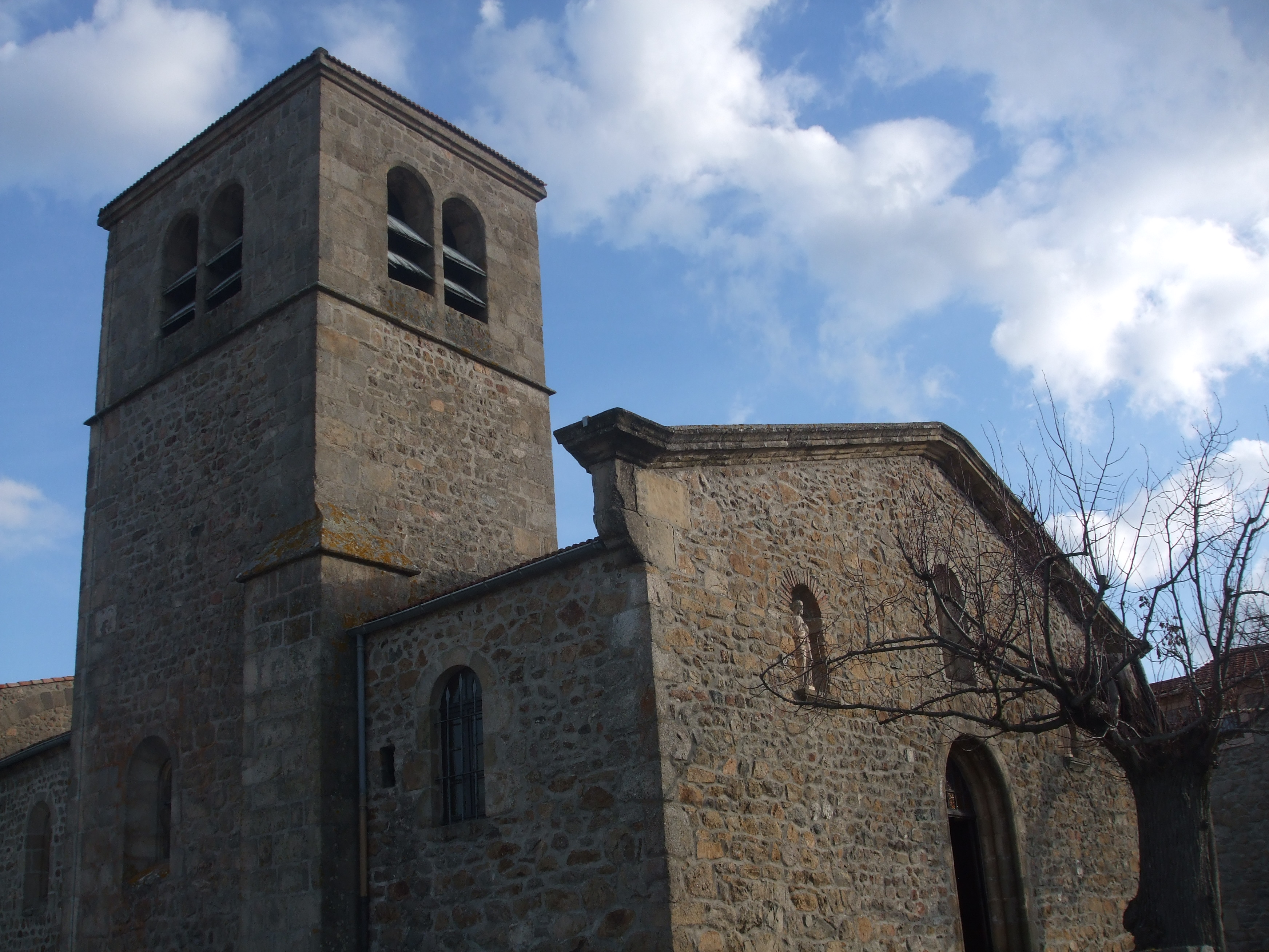 église Saint Barthélemy